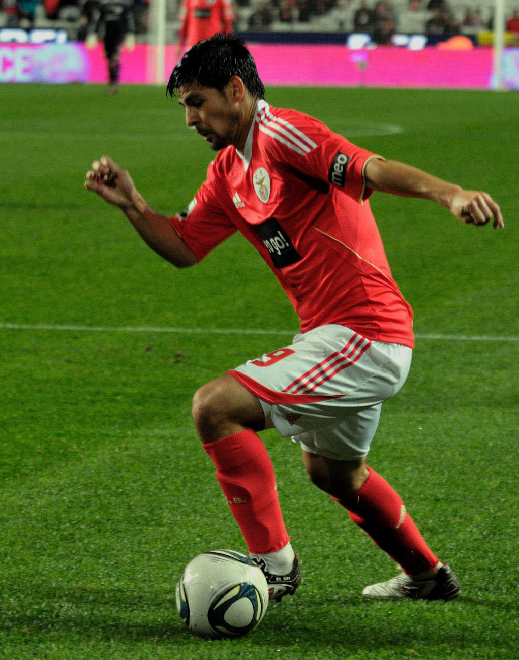 Nolito e Zé Gomes